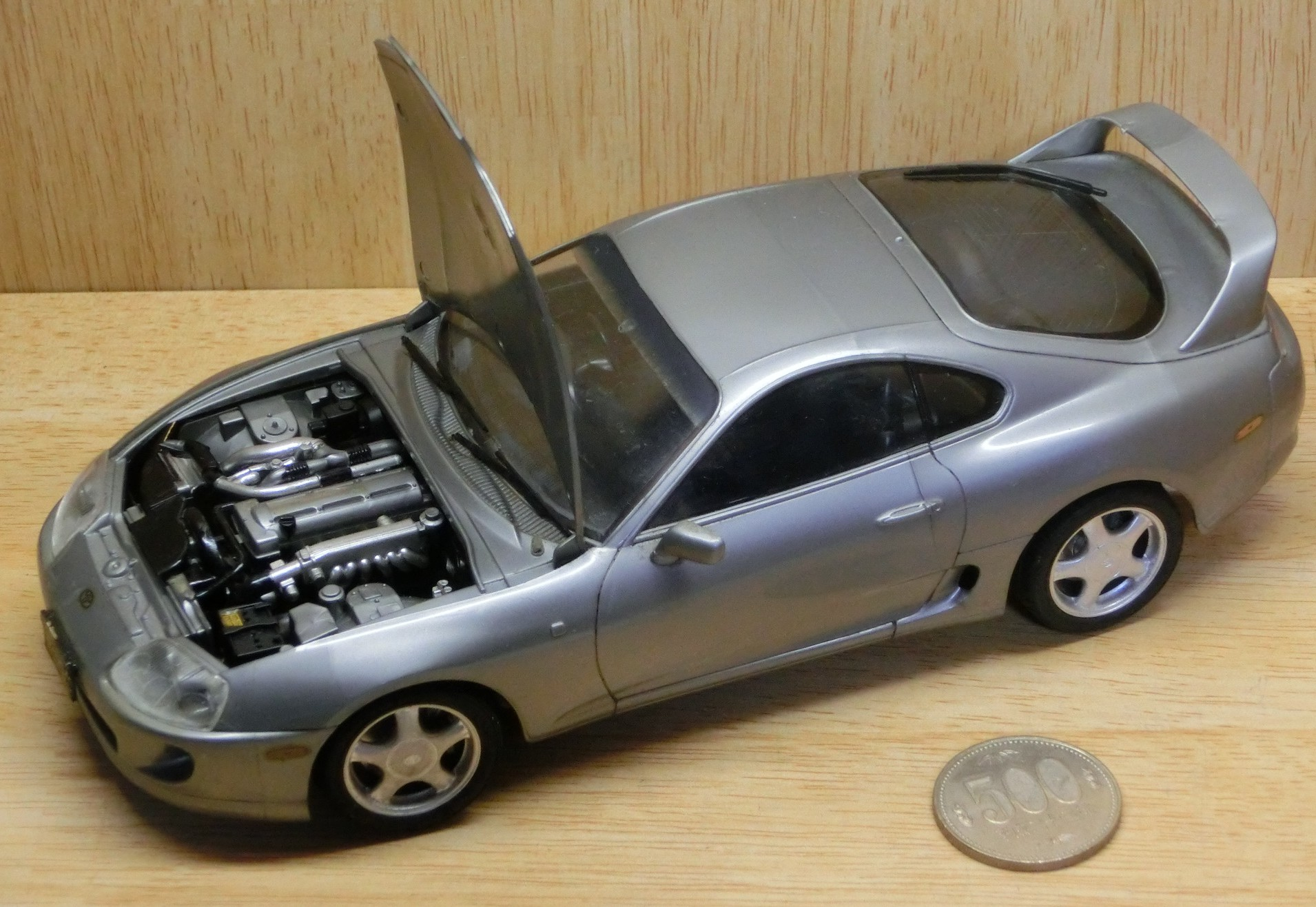 タミヤ 1/24 スポーツカーシリーズ No.123 トヨタ・スープラ フルディスプレイモデル